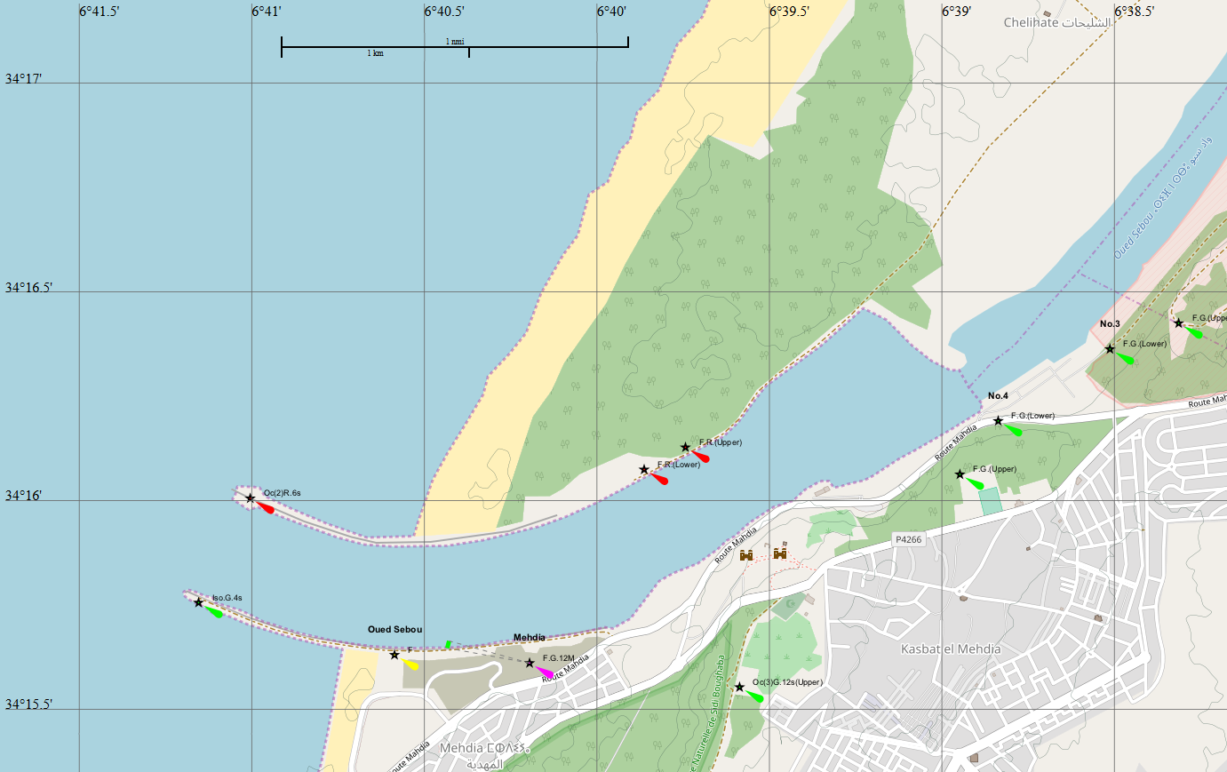 Karte der Hafeneinfahrt von Mehdia in Marokko.